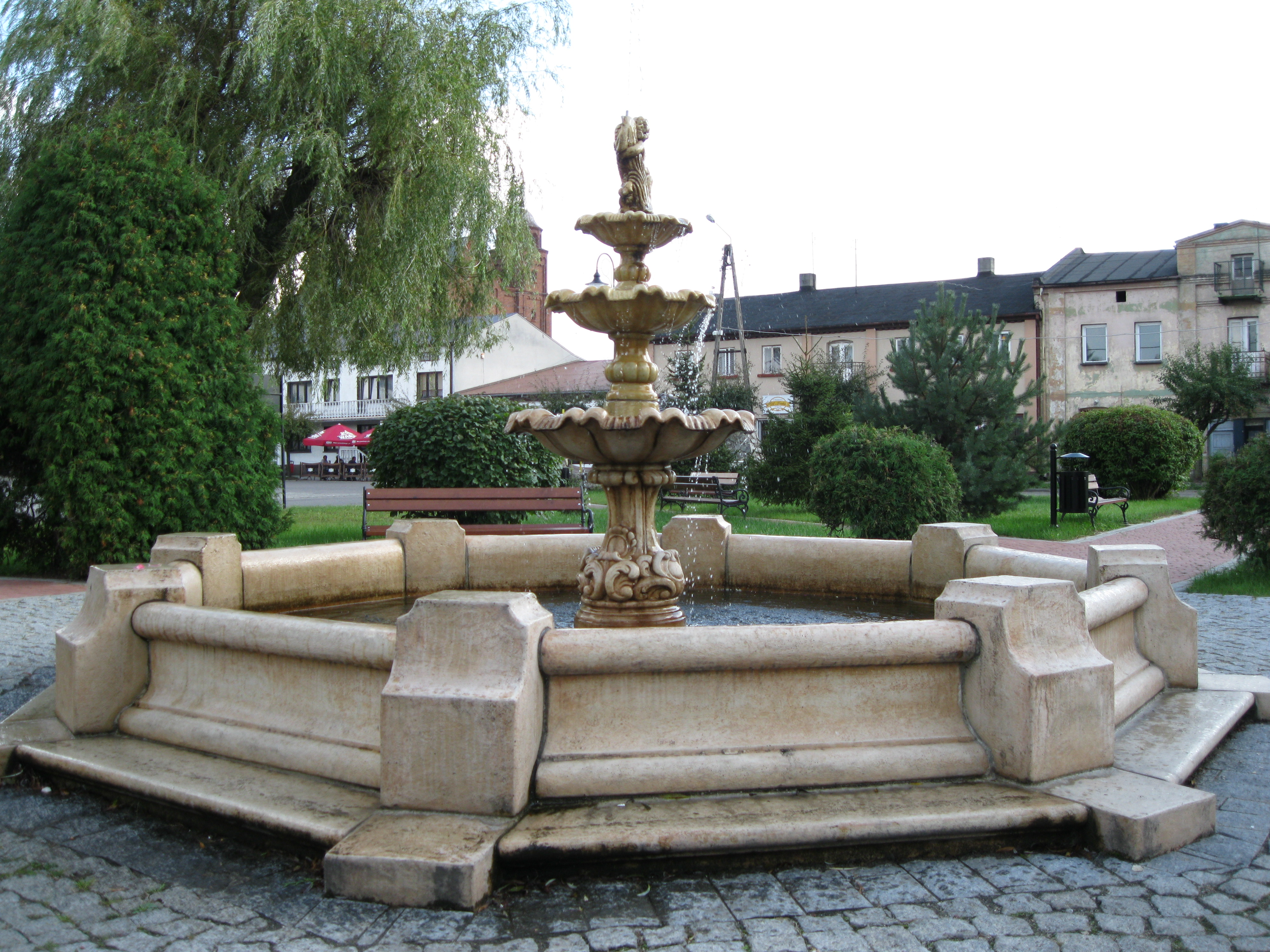 Fontanna w Lututowie